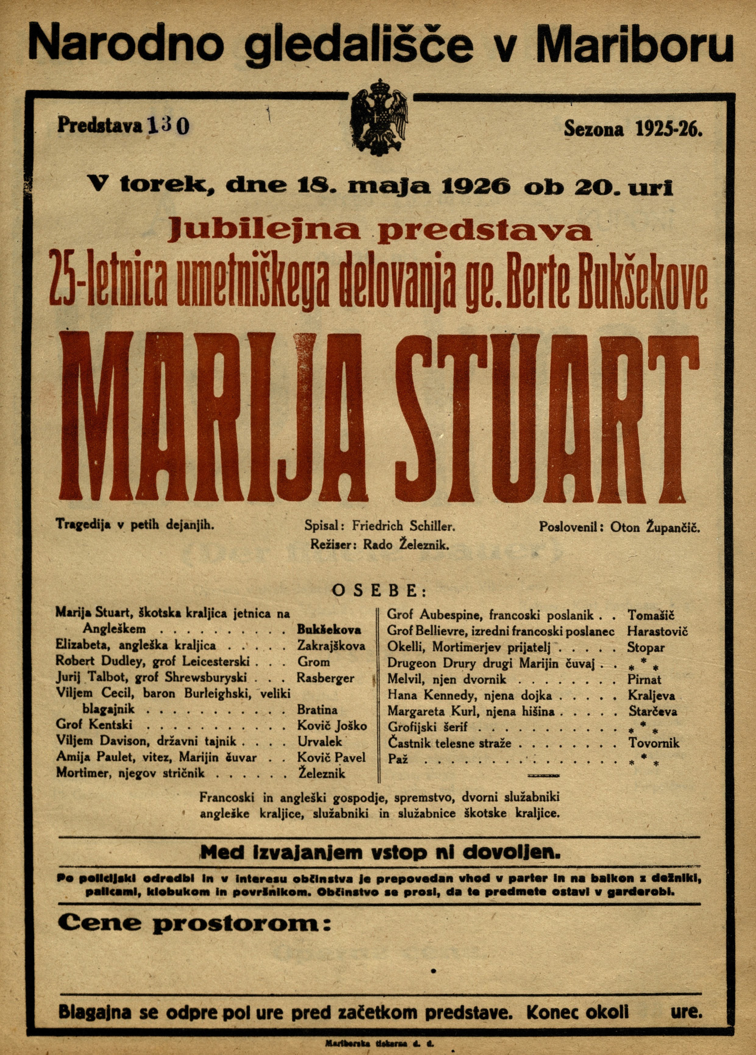 Plakat za predstavo Marija Stuart v Narodnem gledališču v Mariboru.